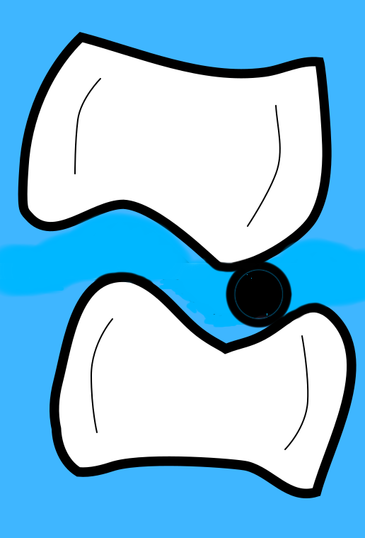 Schematische Darstellung eines Fremdkörpers zwischen den Zähnen